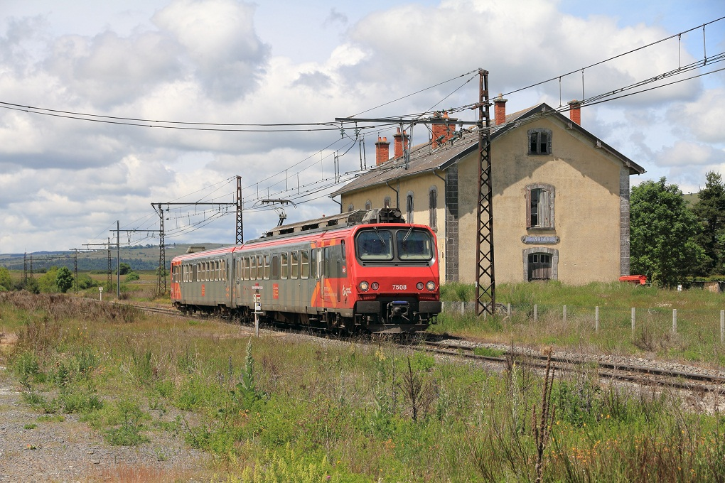 La Z 7508 passe sans arrêt en direction de St-Flour en gare de Talizat en juin 2011, Cantal, France.